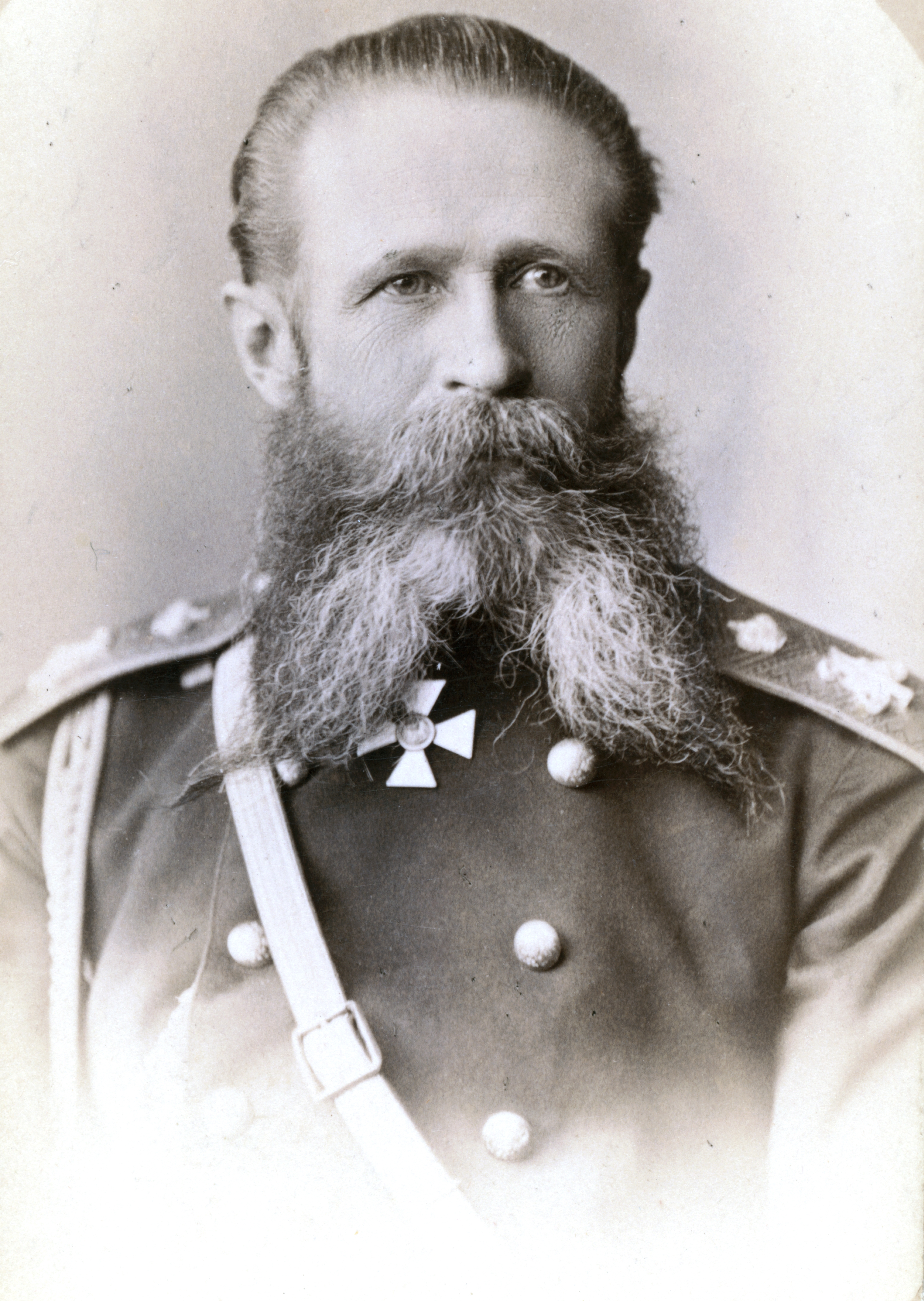 Гурко, Иосиф Владимирович